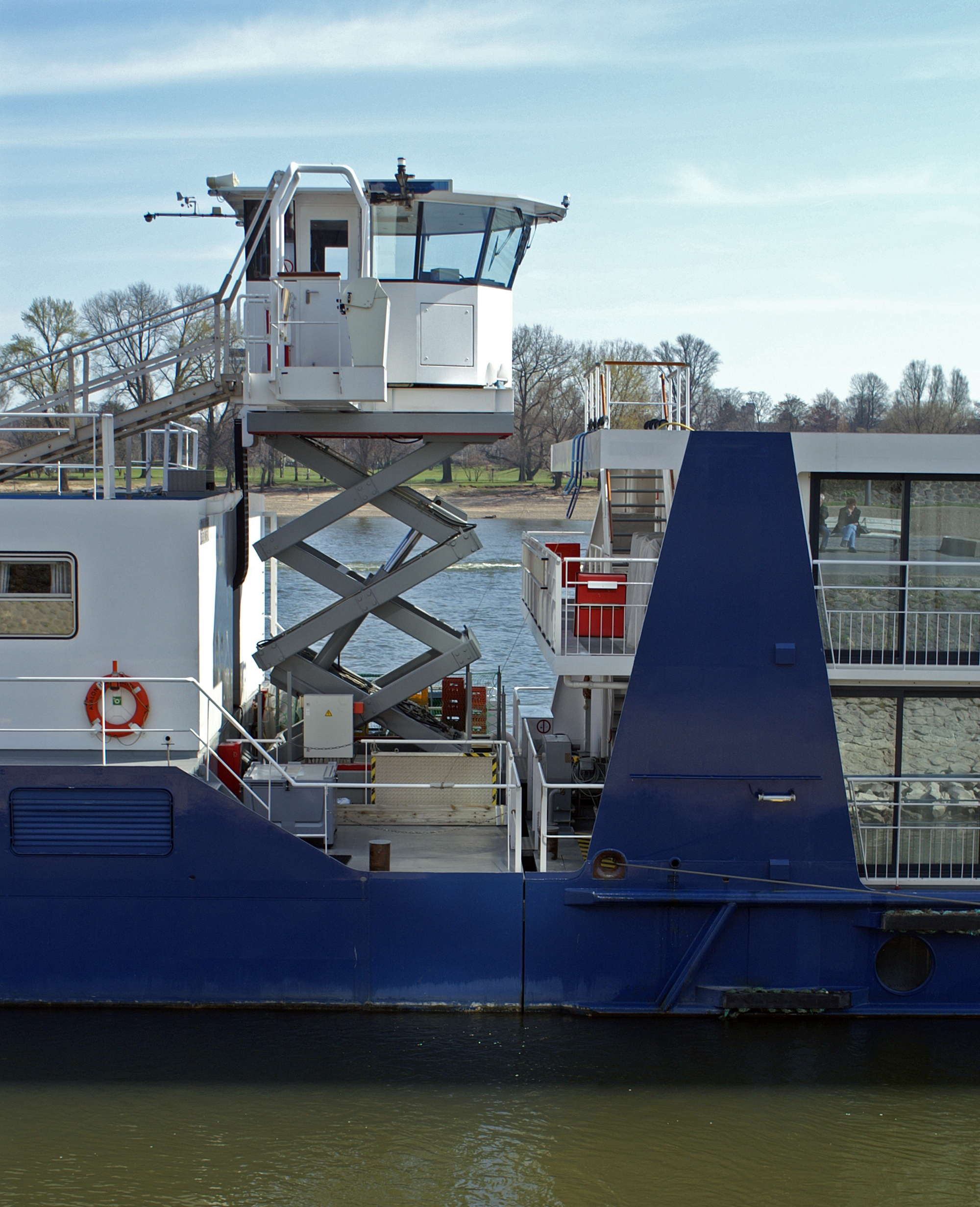 Das hydraulisch absenkbare Steuerhaus des TwinCruisers Avalon Tranquility. Antrieb- und Fahrgasteinheit sind baulich voneinander getrennt.